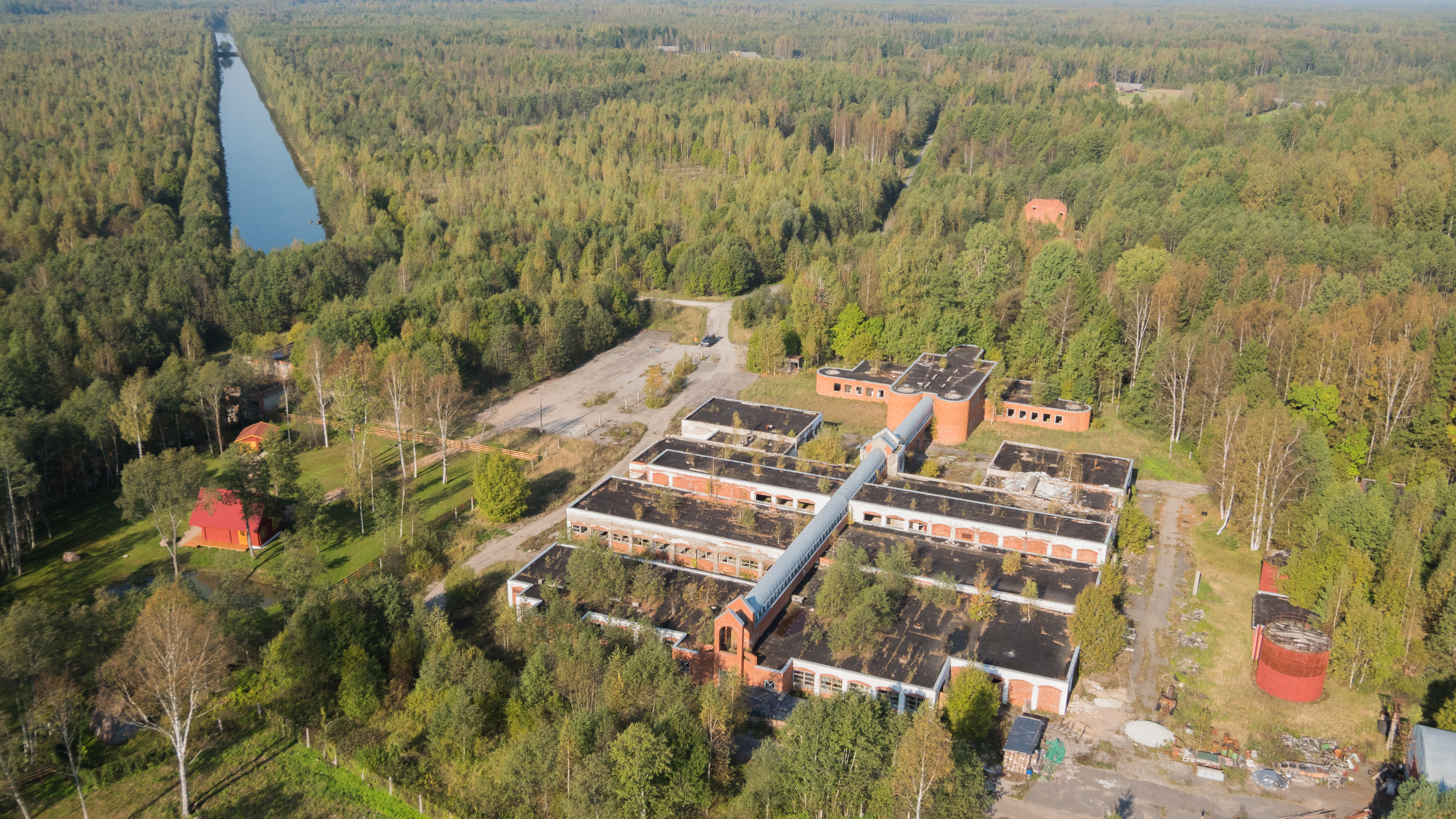 Kirovi kalurikolhoosi Omedu valgumarja tsehh